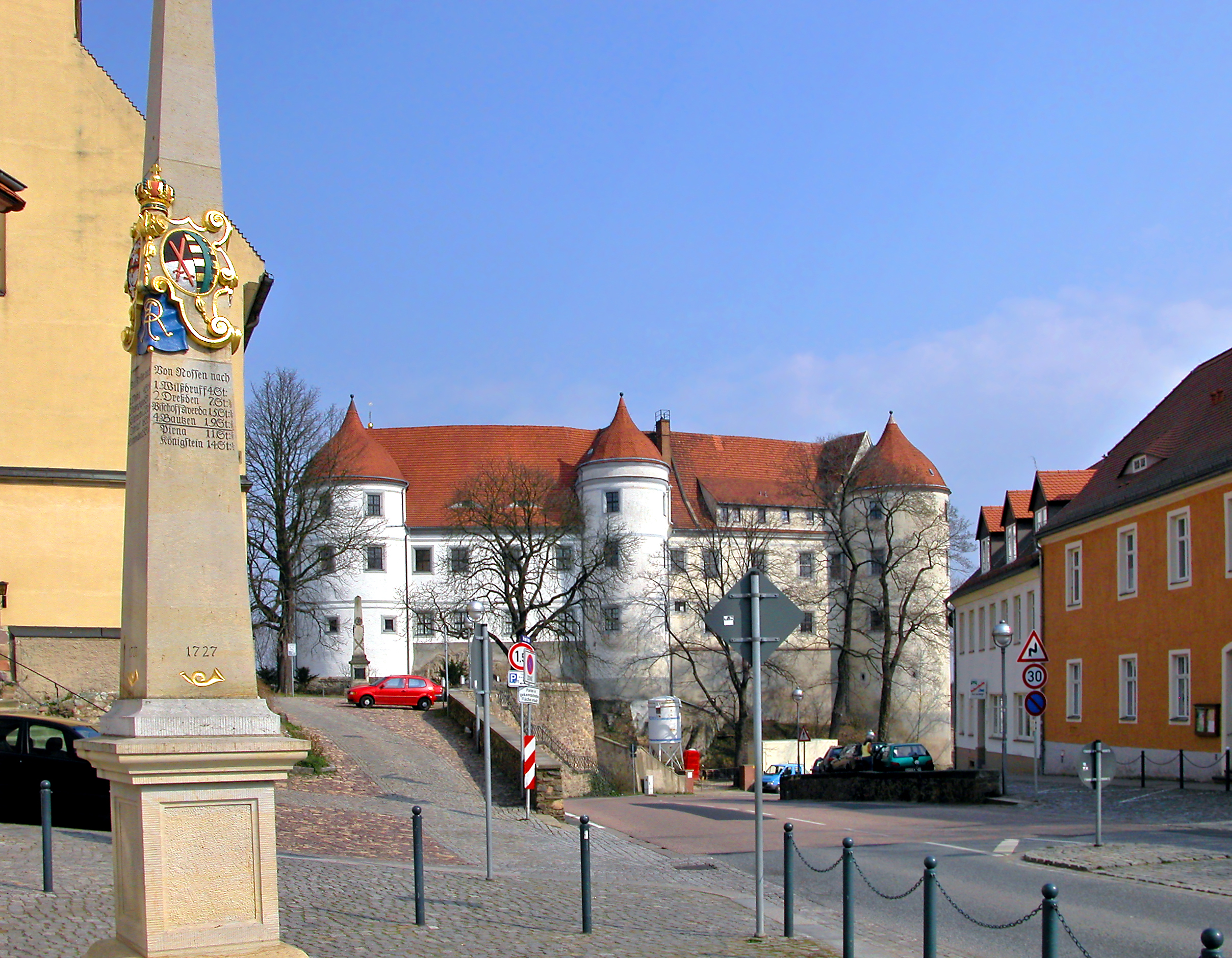 30.03.2007 01683 Nossen: Postmeilensäule und Schloß vom Markt aus gesehen. [DSCN21730.TIF]20070330130DR.JPG(c)Blobelt